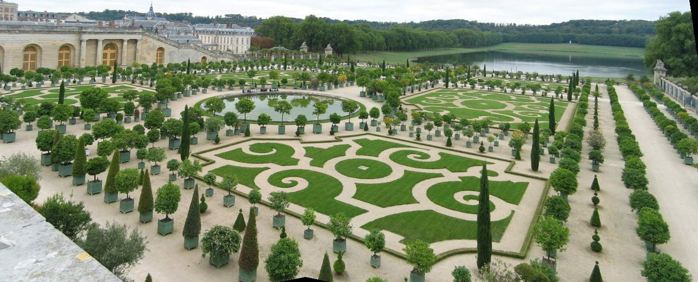 Panorama Orangerie du château de Versailles